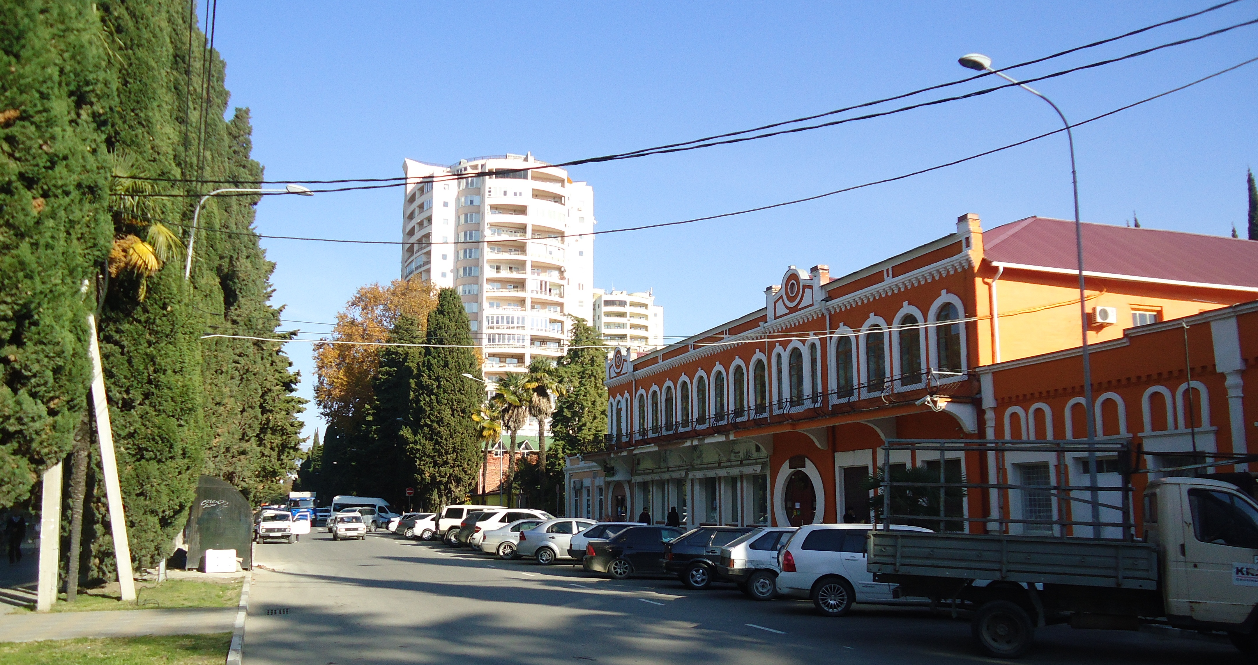 Улица Кирова в Адлерском районе города Сочи